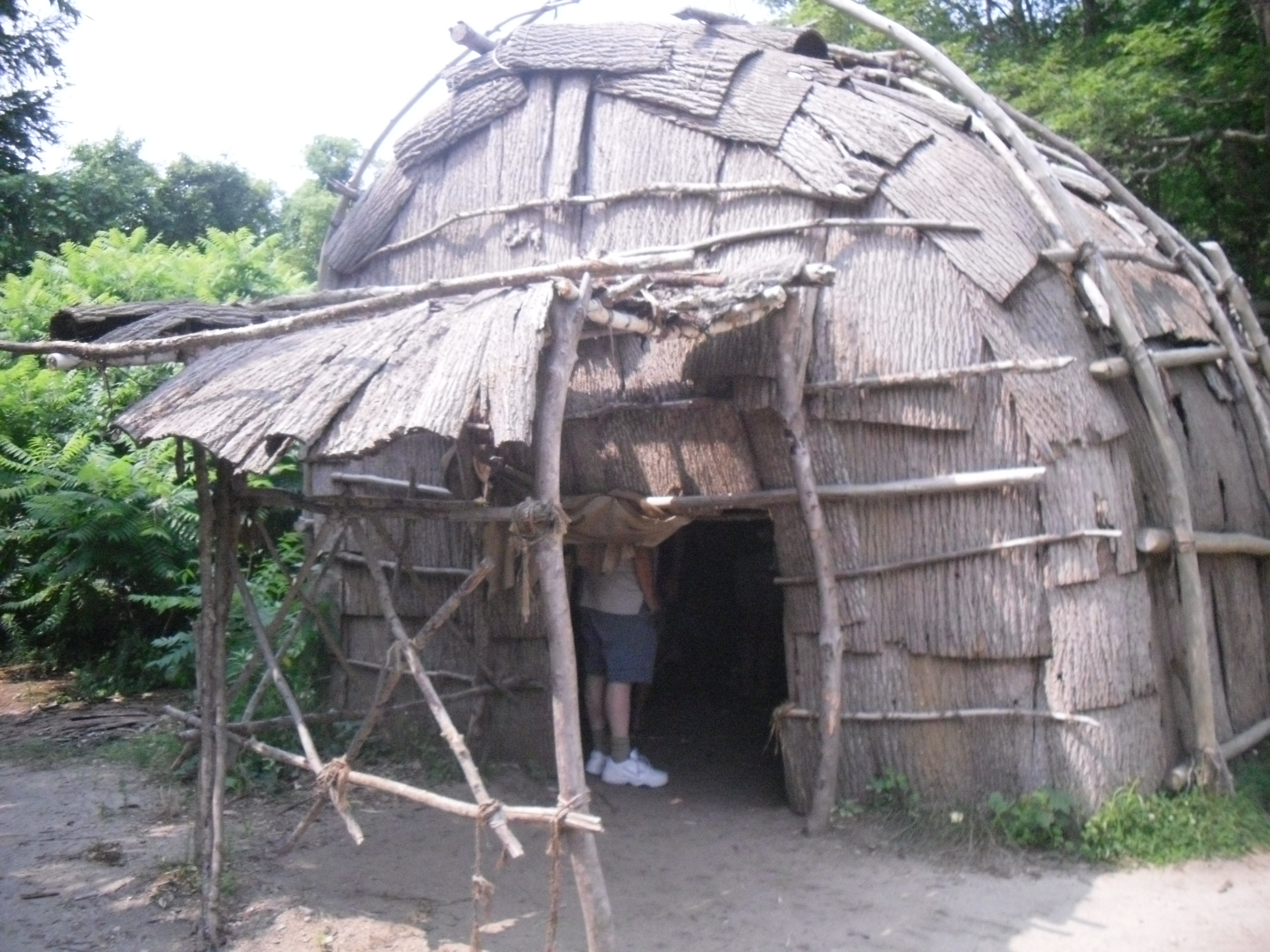 een hutje van de Indianen in de Plimoth Plantation